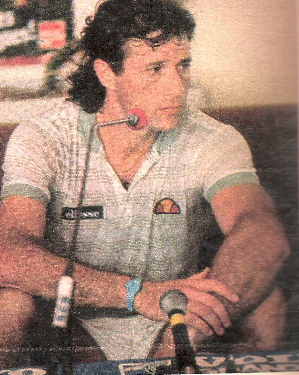 Guillermo Vilas, 1983